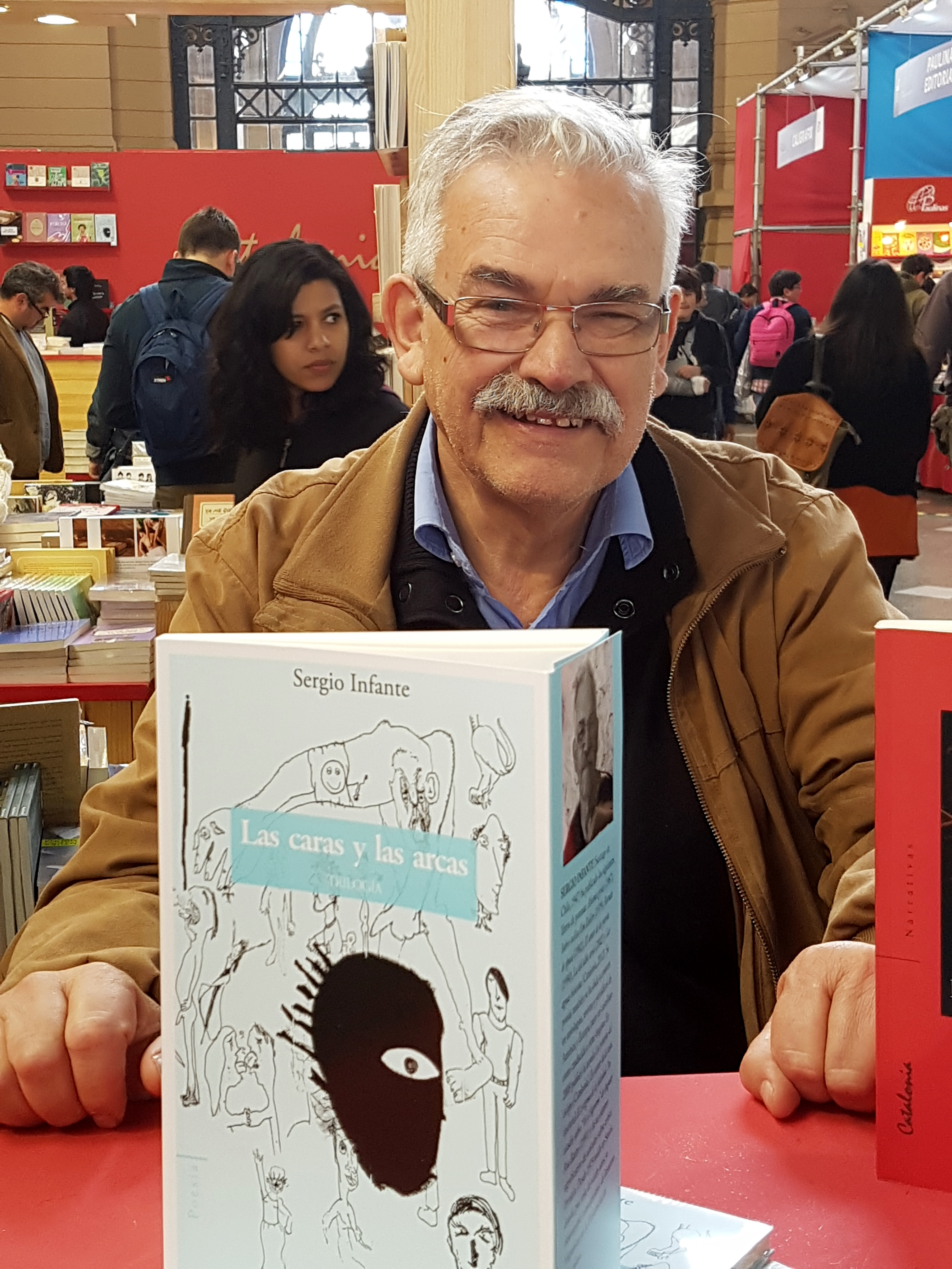 El escritor chileno residente en Suecia Sergio Infante en la Feria Internacional del Libro de Santiago 2017.